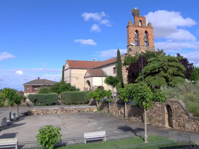 Iglesia de Villaveza